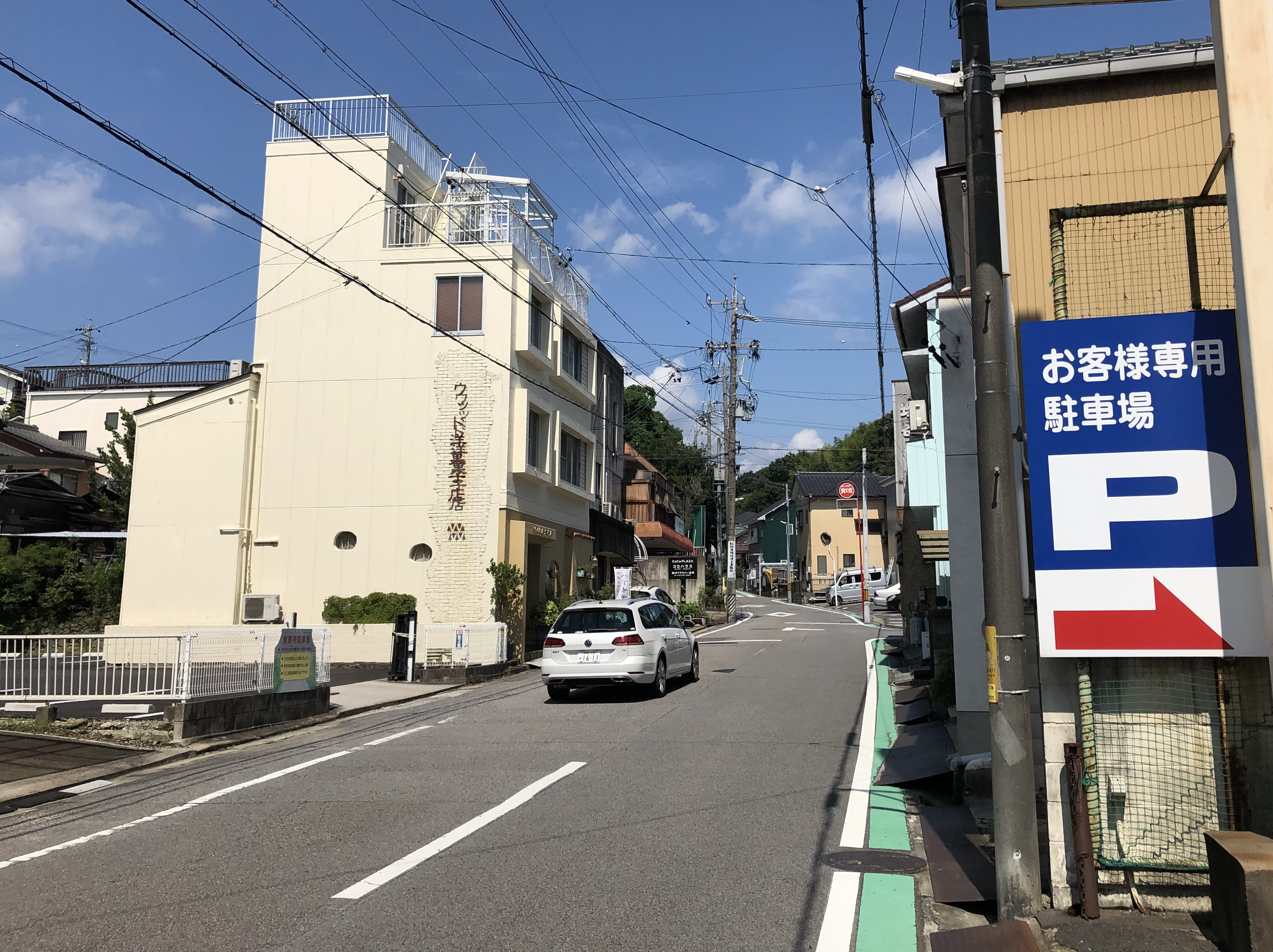 六供配水場（旧六供浄水場）へ至る道路。岡崎市能見通。